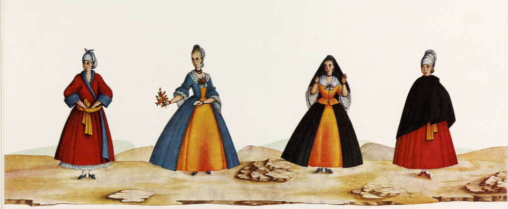 Mulher vestida de quimão (quimono, robe), 2 mulheres usando vestidos à moda européia e mulher de vestido e manta.